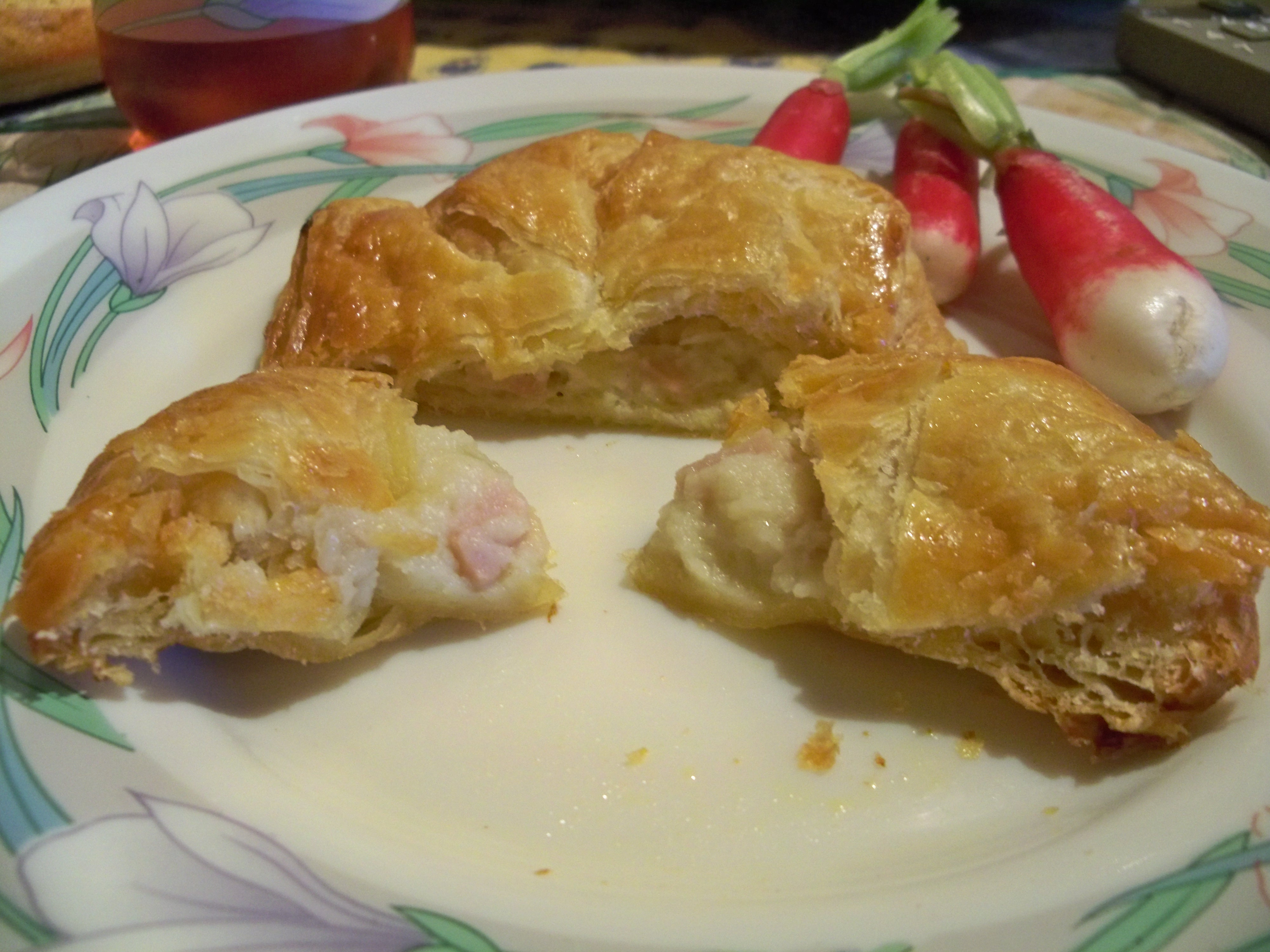 Friand farci au chèvre